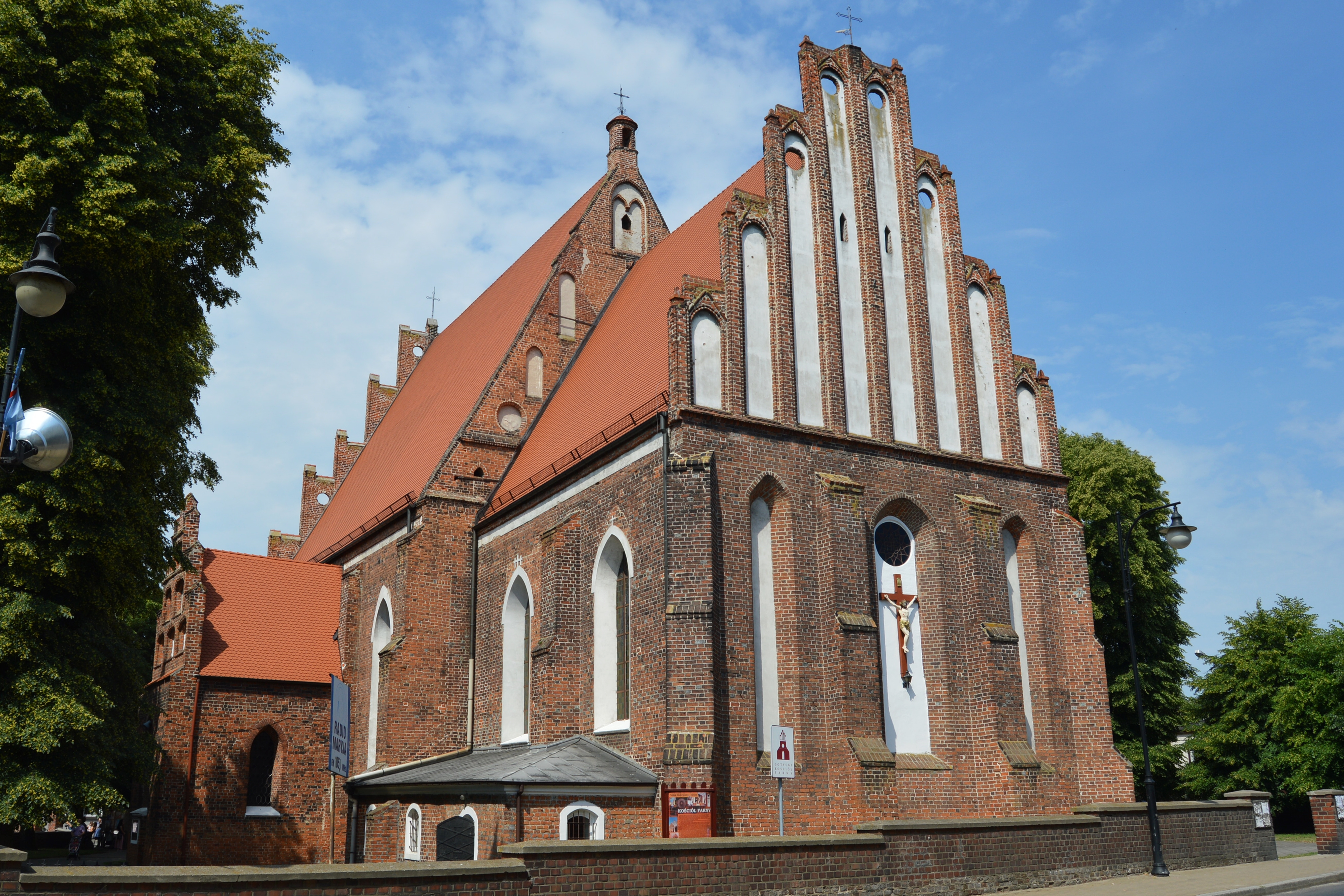 kościół farny Podwyższenia Krzyża Świętego w Kole (widok od ulicy Adama Mickiewicza)